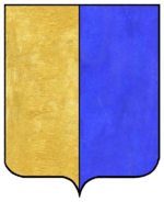 Blason de Moyenvic